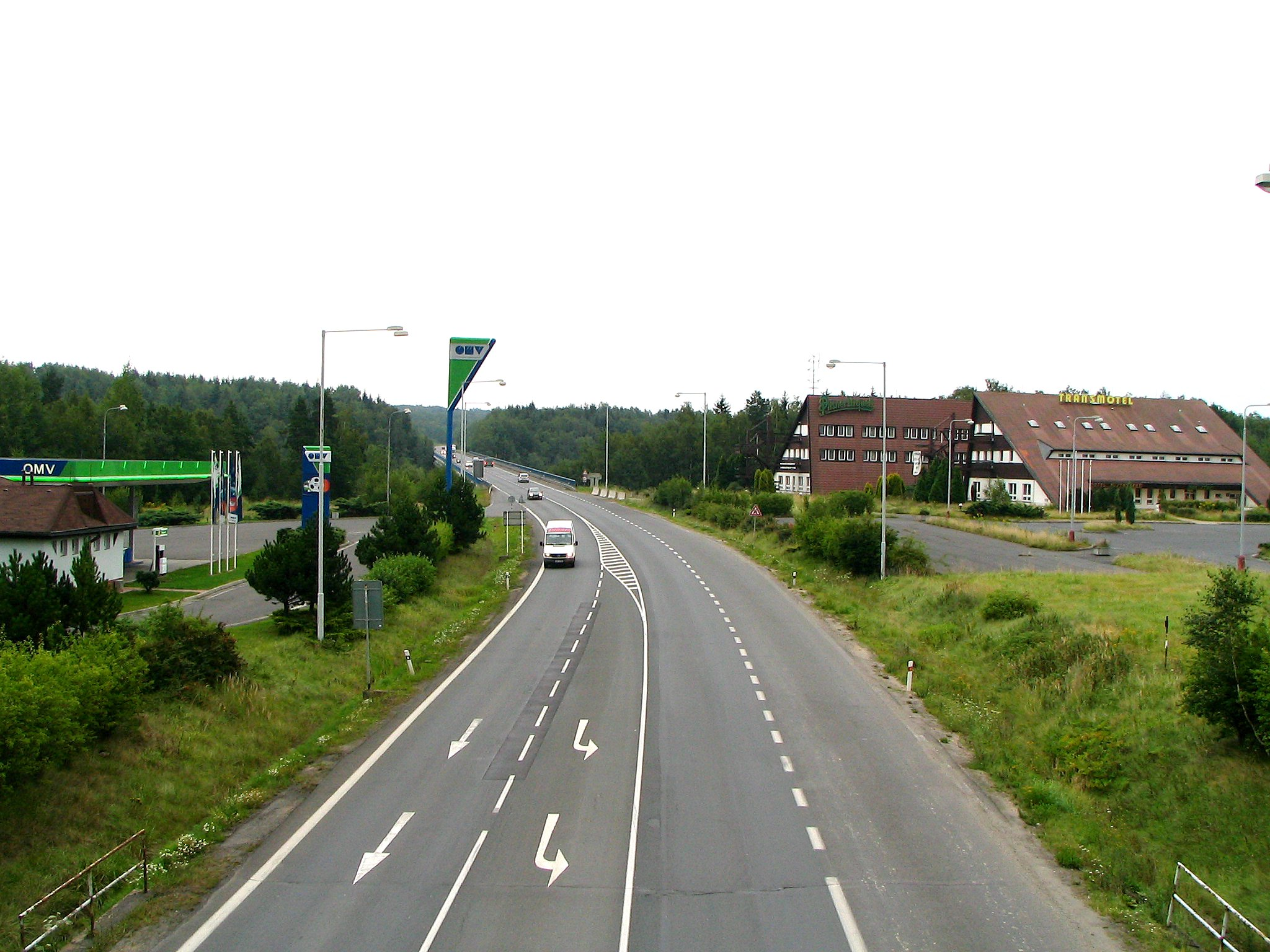 Staré Sedlo, okres Sokolov, silnice I/6 (budoucí R6), obchvat Sokolova, u motelu Sokolov.